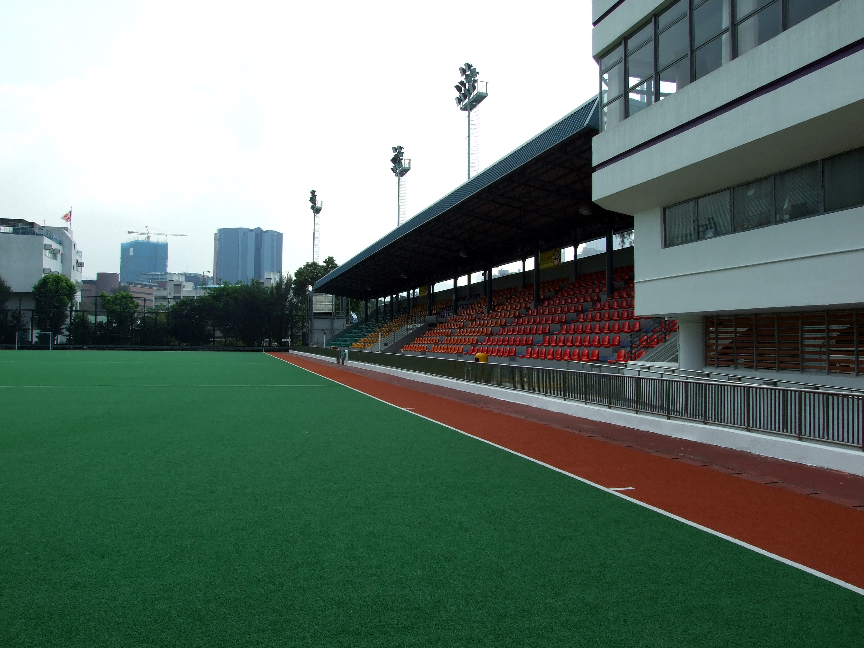 中文（香港）: 京士柏曲棍球場看台